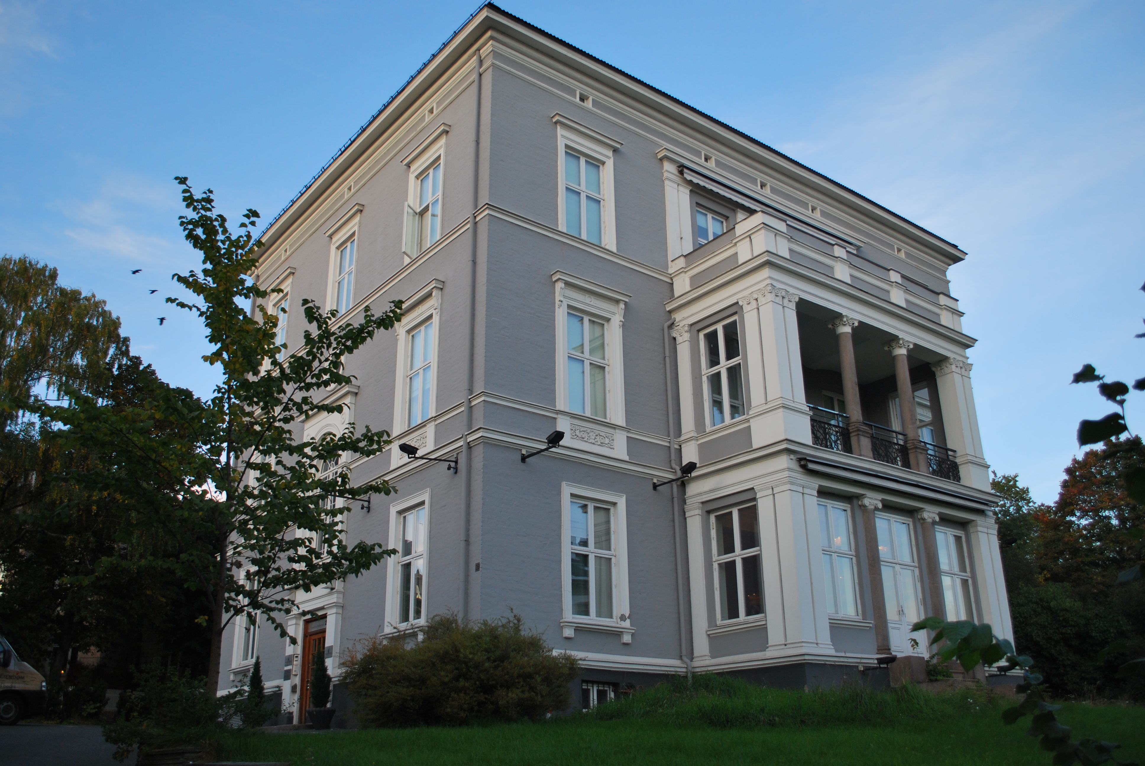 Colbjørnsens gate 3 (tidl. Incognitogata 26), oppført 1890, Bak Slottet, Oslo